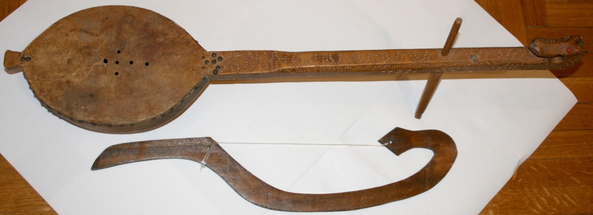 Gusle koje se u Muzeju grada Šibenika nalaze se od 1948. godine.